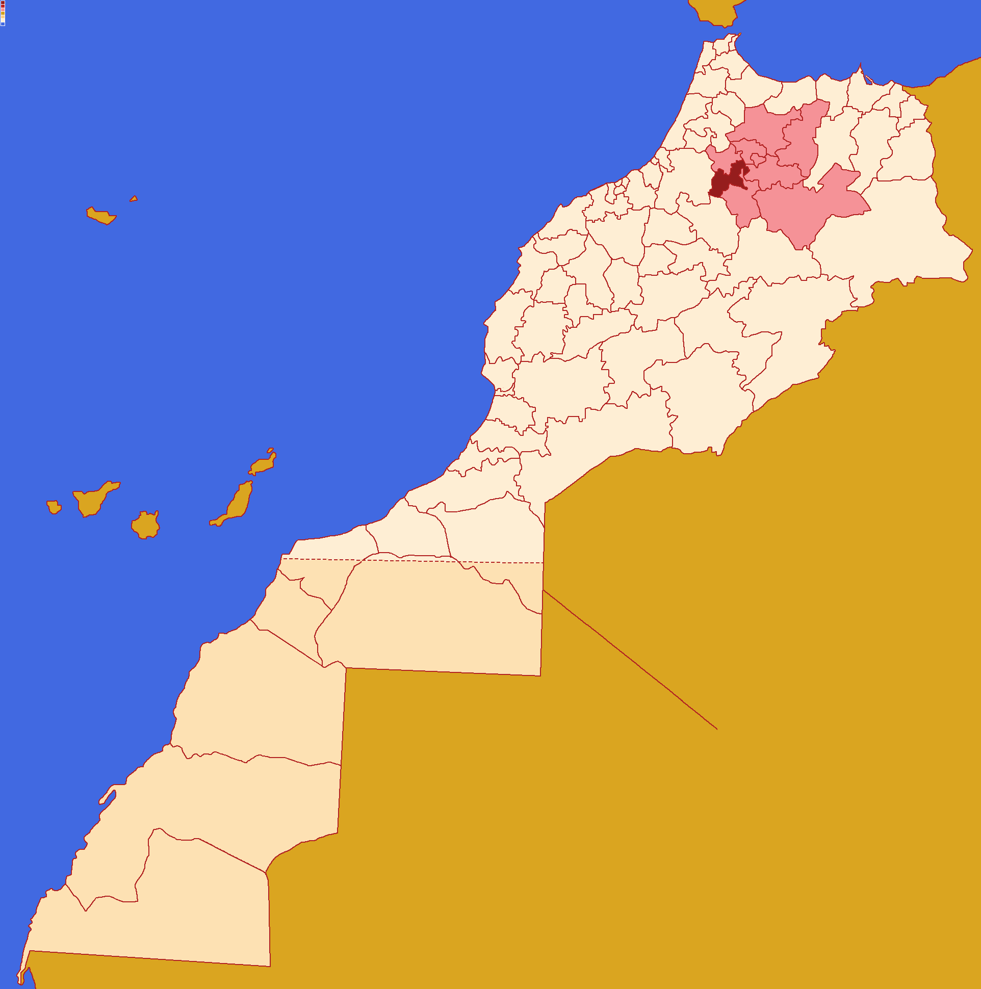 Localização da província de El Hajeb ,dentro da região de Fez-Meknès e dentro de Marrocos.Conforme a reforma administrativa de 2015.